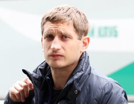 Сергі́й Олекса́ндрович Само́дін (*14 лютого 1985, Ставрополь) — російський футболіст, під час виступів за Чорноморець